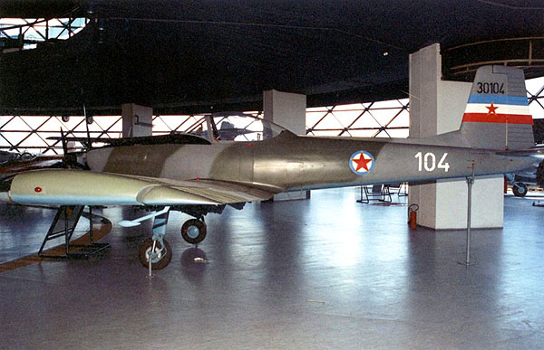 J-20 Kraguj, Belgrade Aviation Museum